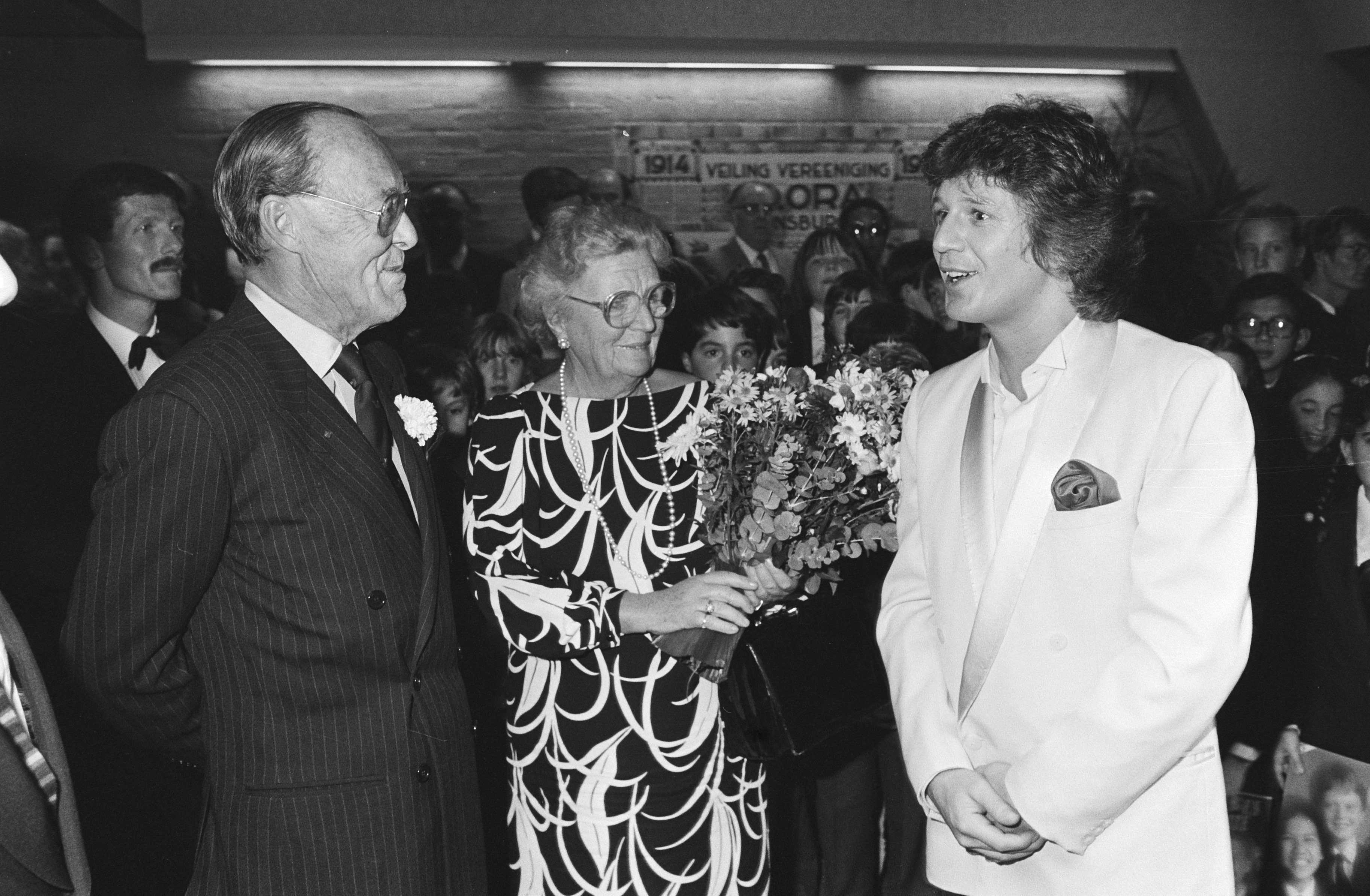 Collectie / Archief : Fotocollectie Anefo Reportage / Serie : Prinses Juliana en prins Bernhard zijn aanwezig op het Bloemengala Rijnsburg 1982, dat in het teken staat van de actie "Oerwoud Indonesië" van het Wereld Natuurfonds Nederland Beschrijving : Prinses Juliana, prins Bernhard met zanger Gérard Lenorman Datum : 19 november 1982 Locatie : Rijnsburg, Zuid-Holland Trefwoorden : prinsen, prinsessen, zangers Persoonsnaam : Bernhard, prins, Juliana, koningin, Lenorman, Gérard Fotograaf : Antonisse, Marcel / Anefo Auteursrechthebbende : Nationaal Archief Materiaalsoort : Negatief (zwart/wit) Nummer archiefinventaris : bekijk toegang 2.24.01.05 Bestanddeelnummer : 932-4147